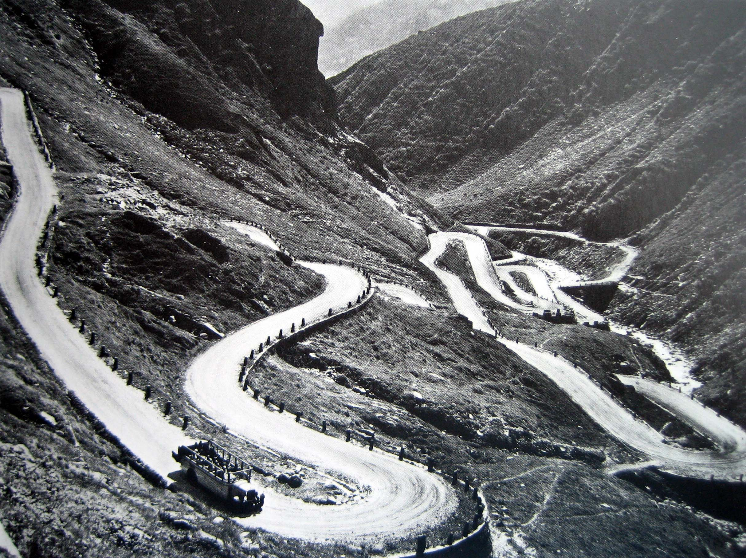 Tremola mit Car Alpin, 1928